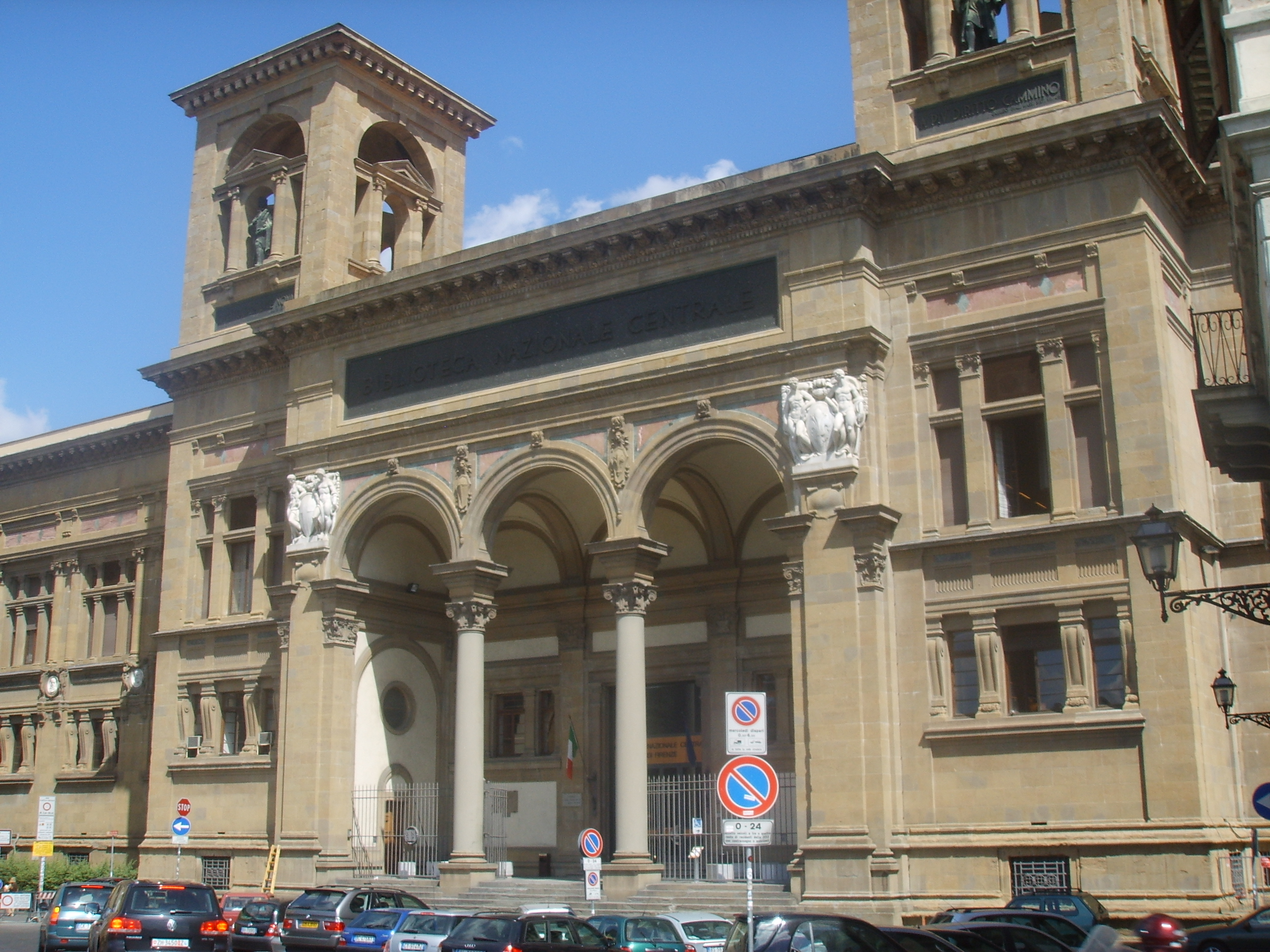 Biblioteca_Nazionale_Centrale_di_Firenze, Florence national library in Florence, Italy